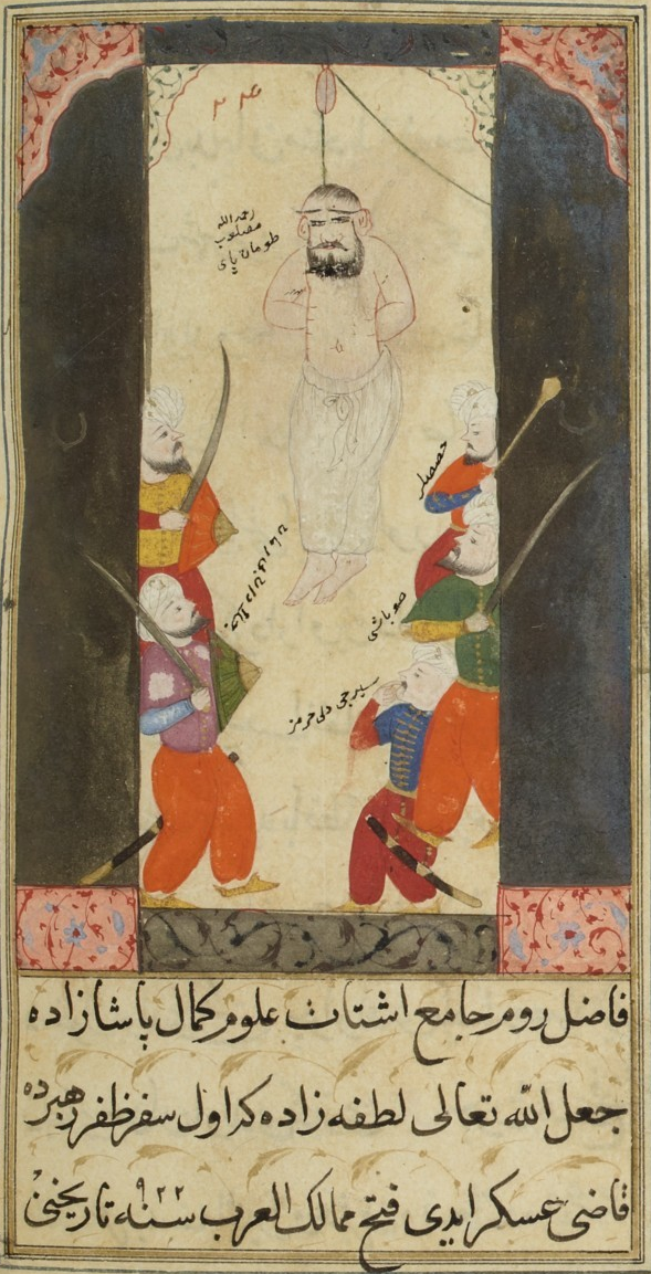 Tomanbay'ın 15 Nisan 1517'de gerçekleşen idamı